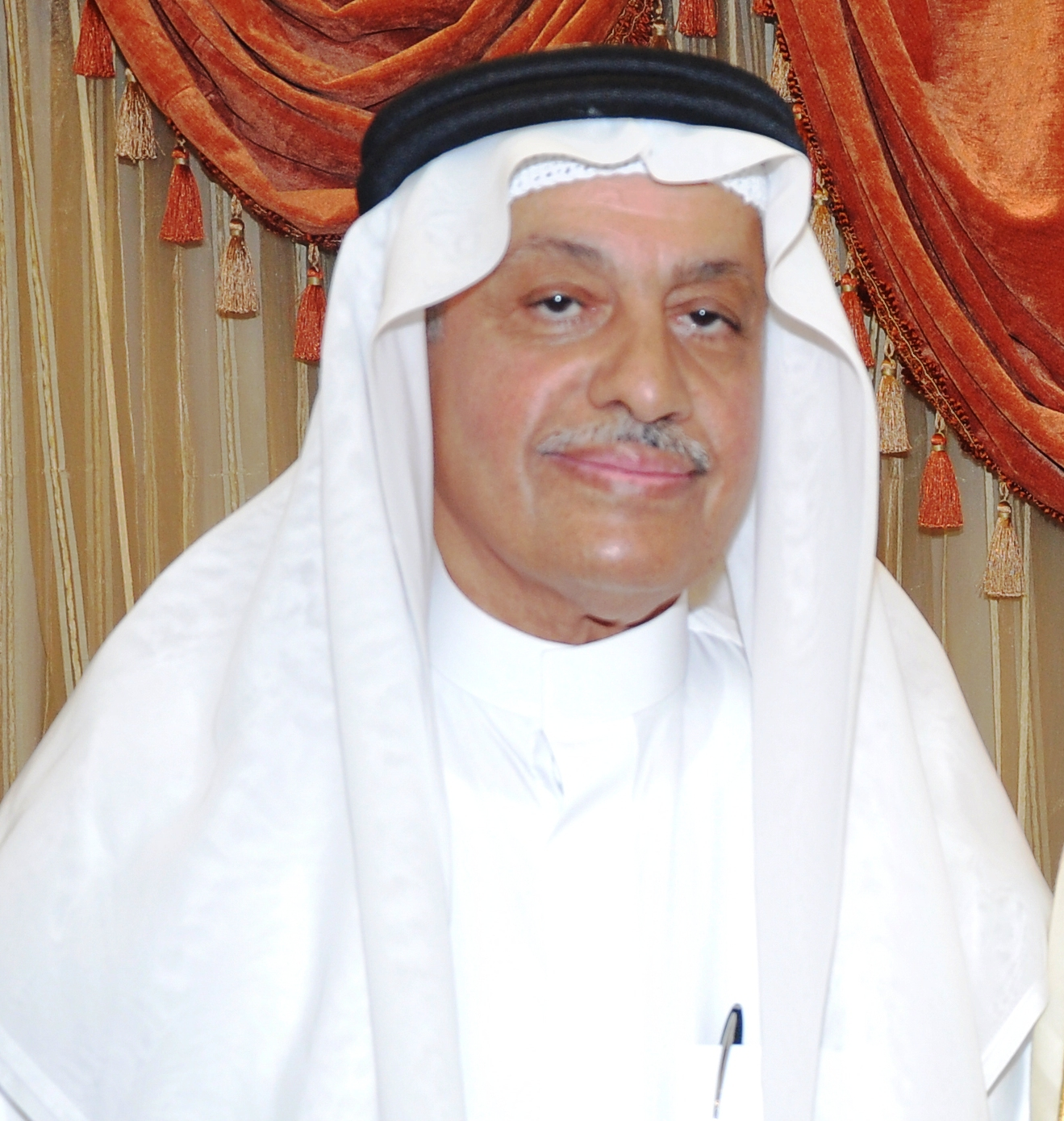 الدكتور علي محسن السقاف استشاري طب وجراحه العيون